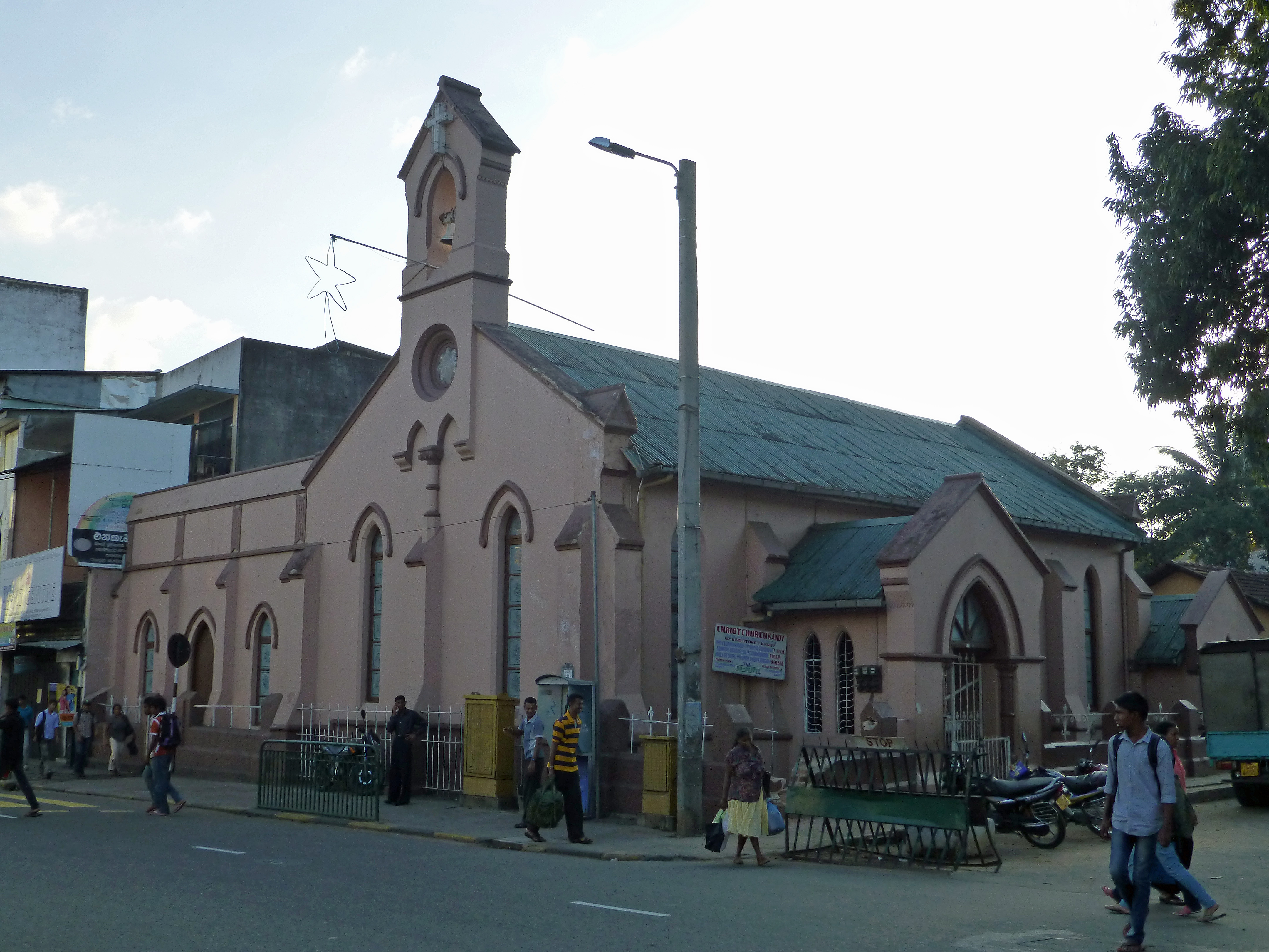 Christ Church à Kandy (Sri Lanka). Eglise anglicane de la communauté de langue tamoule.